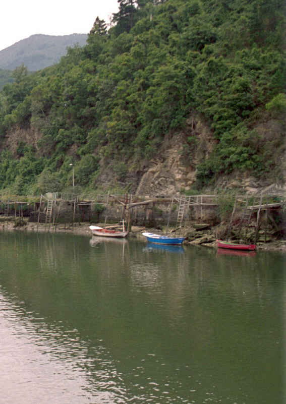 Embarcaderos en la ría de Deba en Guipúzcoa (España). Tomada por JMSE el 6 de Julio de 2003 y cedida a Wikipedia. Categoría: España (imagen)